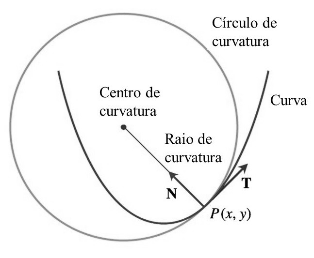 Circulo de curvatura